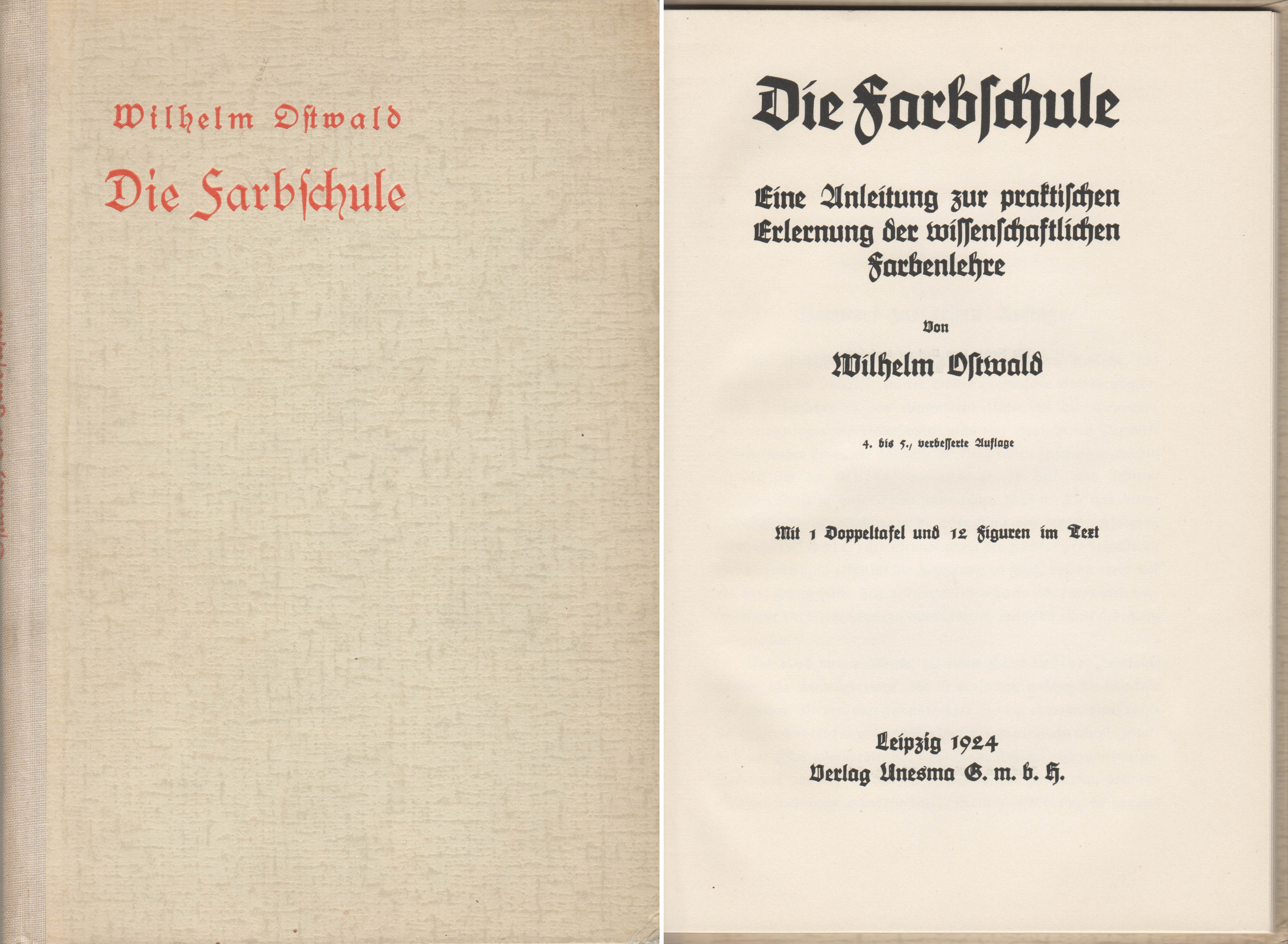 Buch Die Farbschule, Autor Wilhelm Ostwald, Verlag Unesma GmbH Leipzig 5. Auflage 1924